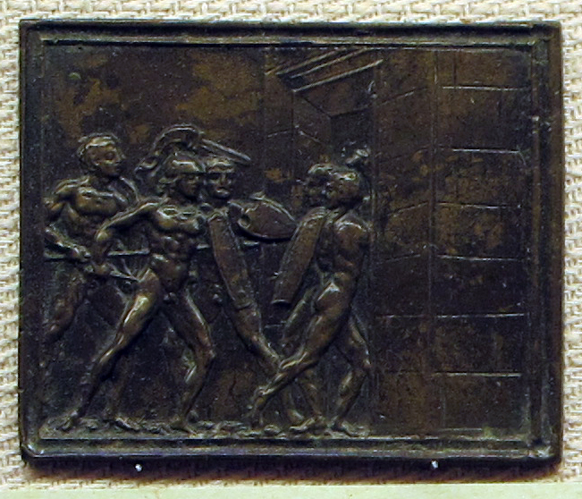 Placchette rinascimentali